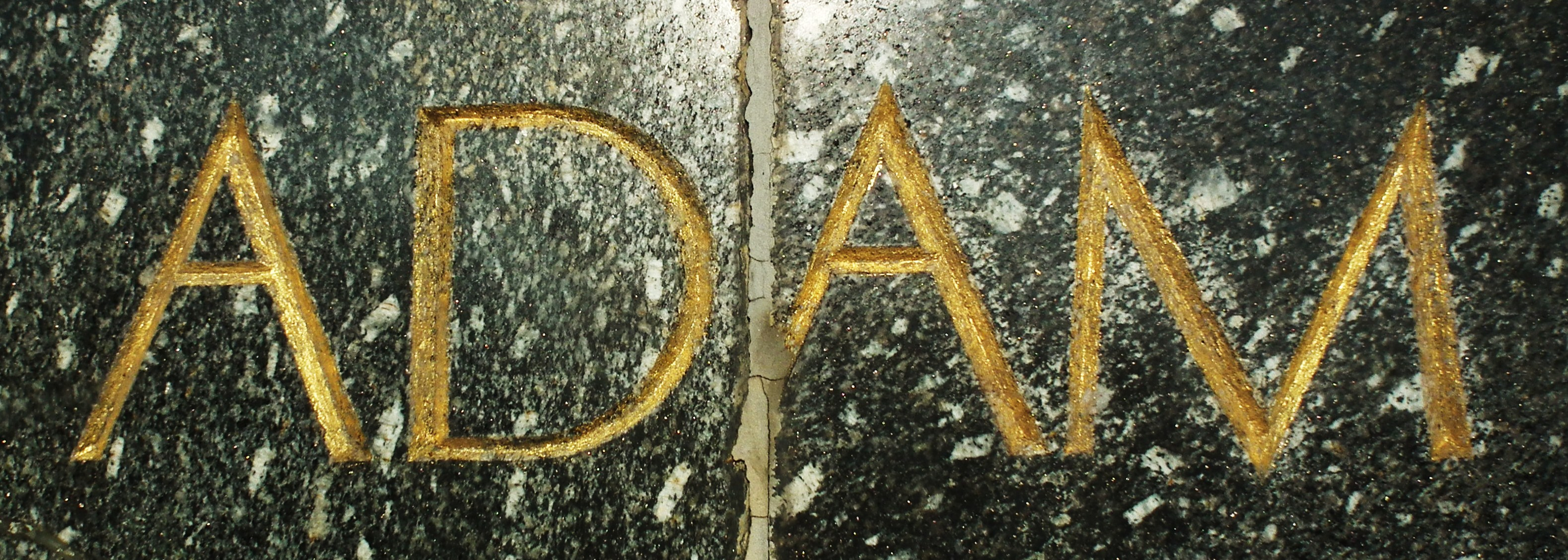 Fragm. pomnika Mickiewicza w Poznaniu.